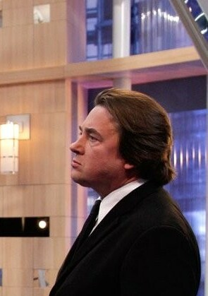 Константин Эрнст